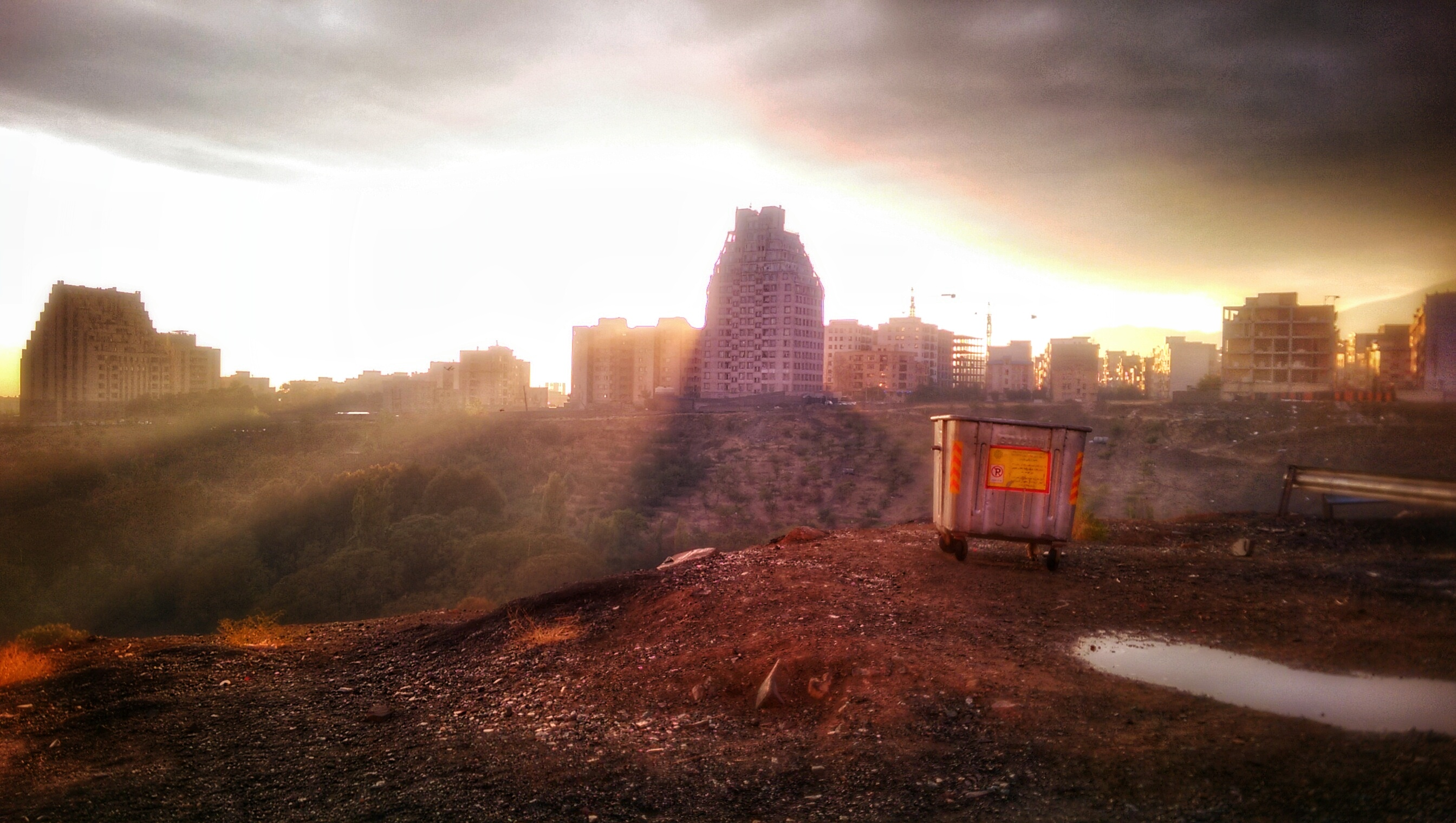 تصویری از ساختمای های سعادت آباد در ساعت های منتهی به غروب.